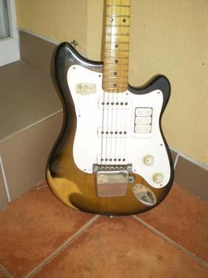 Cuerpo de una Resonet Futurama con desgaste, y mástil de maple